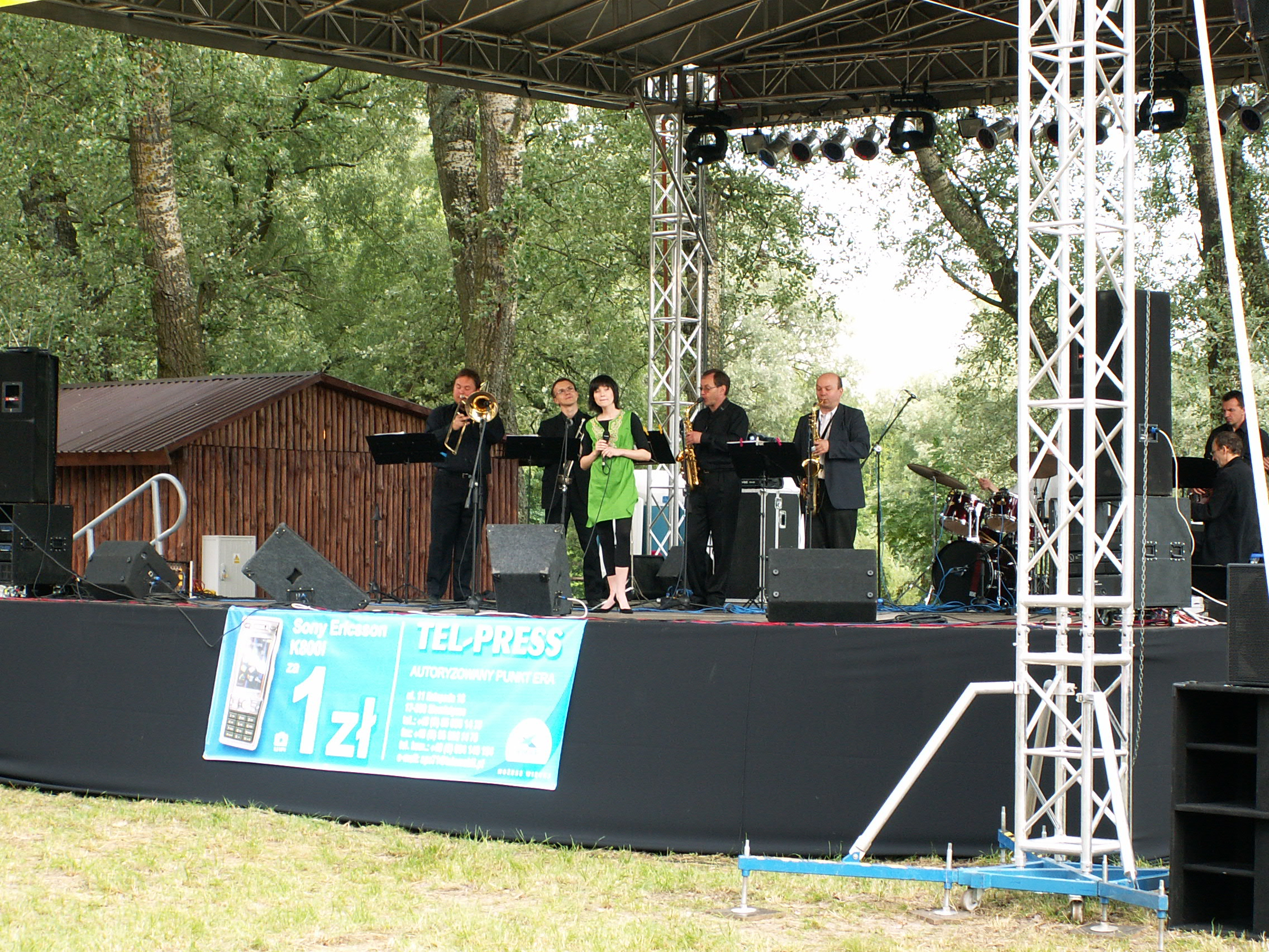 Występ zespołu w trakcie Dni Mielnika w 2007 roku.